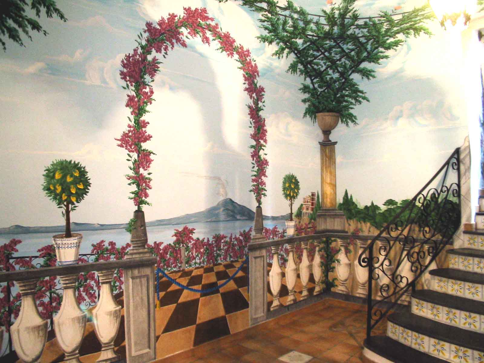 balaustra e panorama TROMPE L'OEIL